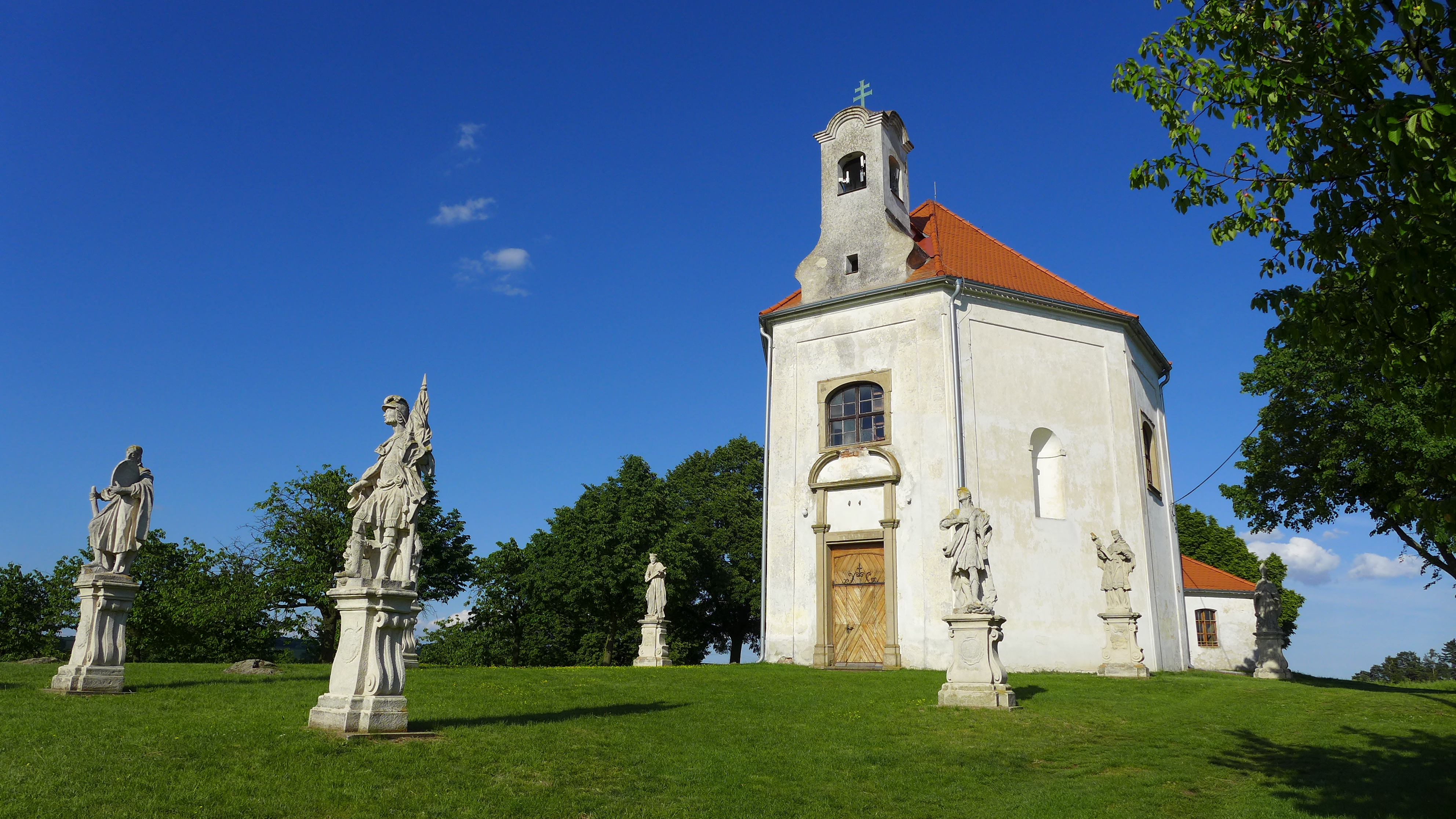 Kaple svaatého Jana Nepomuckého, Rešice.